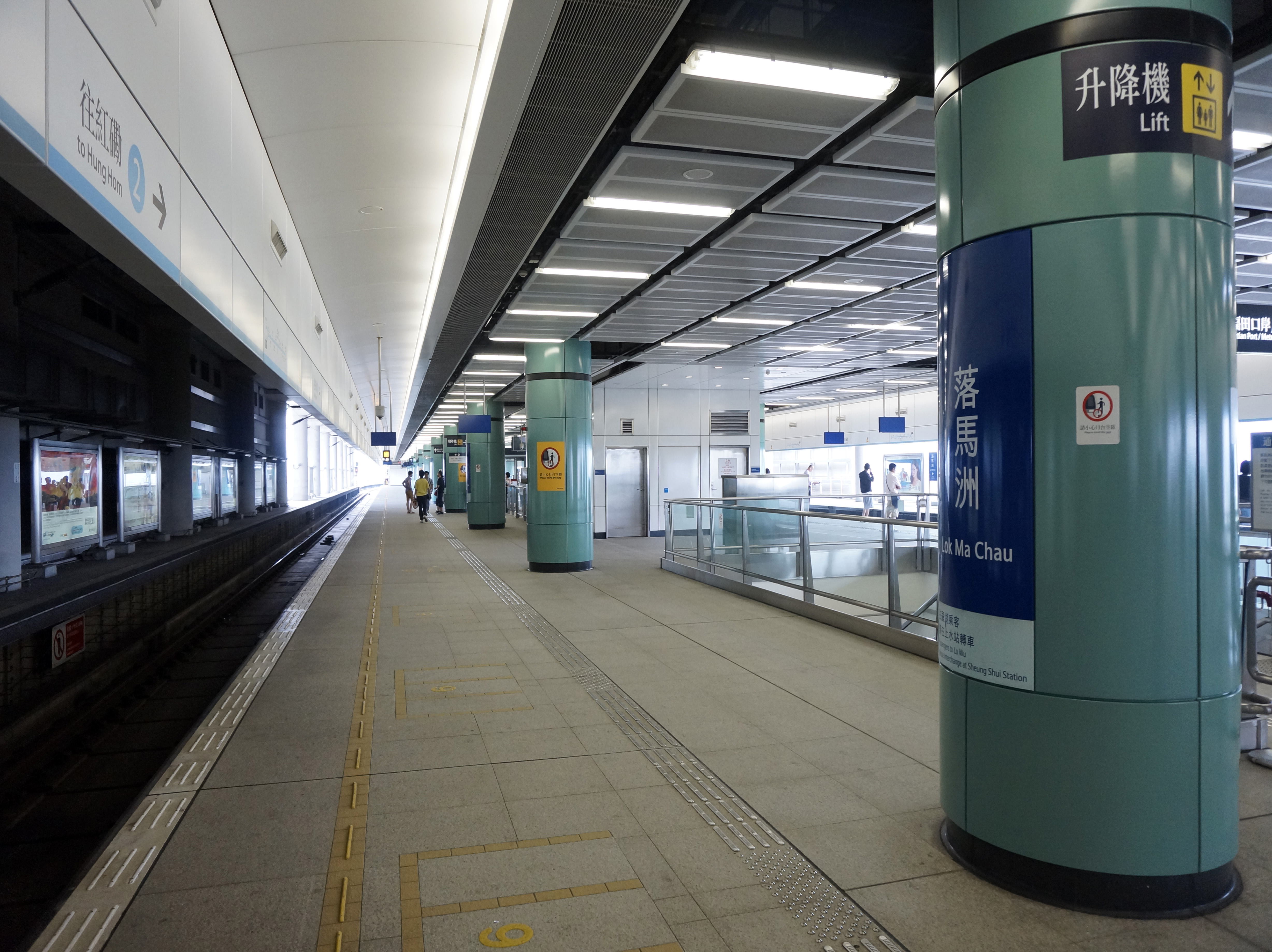 港鐵落馬洲站月台